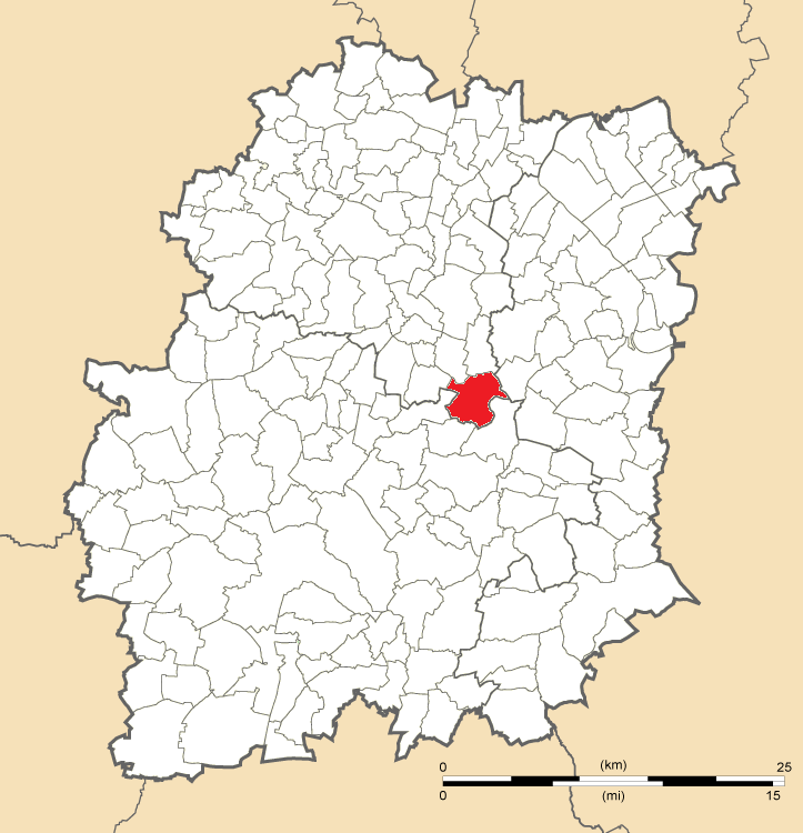 Carte de position de Saint-Vrain en Essonne (91)